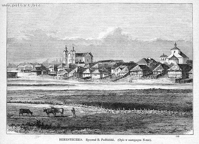 Гравюра "Берестечко" Подбєльського: Вид на Берестечко із правого берега річки Стир.